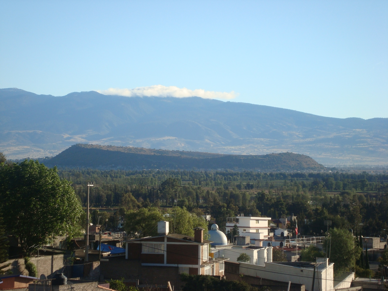 El cerro de Xico, como se ve desde el volcán Teuhtli en Tláhuac.